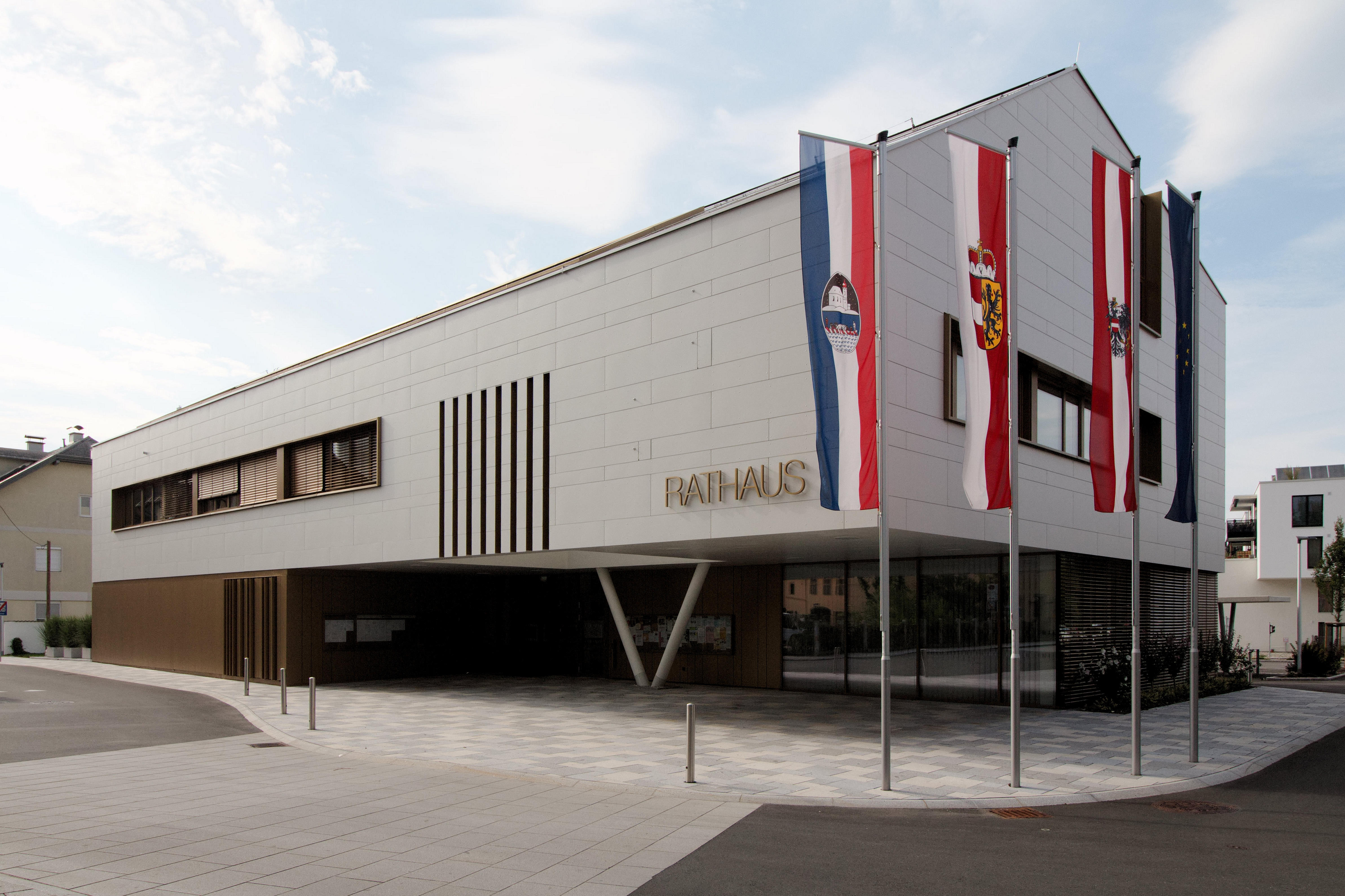 Oberndorf bei Salzburg: das neue Rathaus im Zentrum der Stadtgemeinde